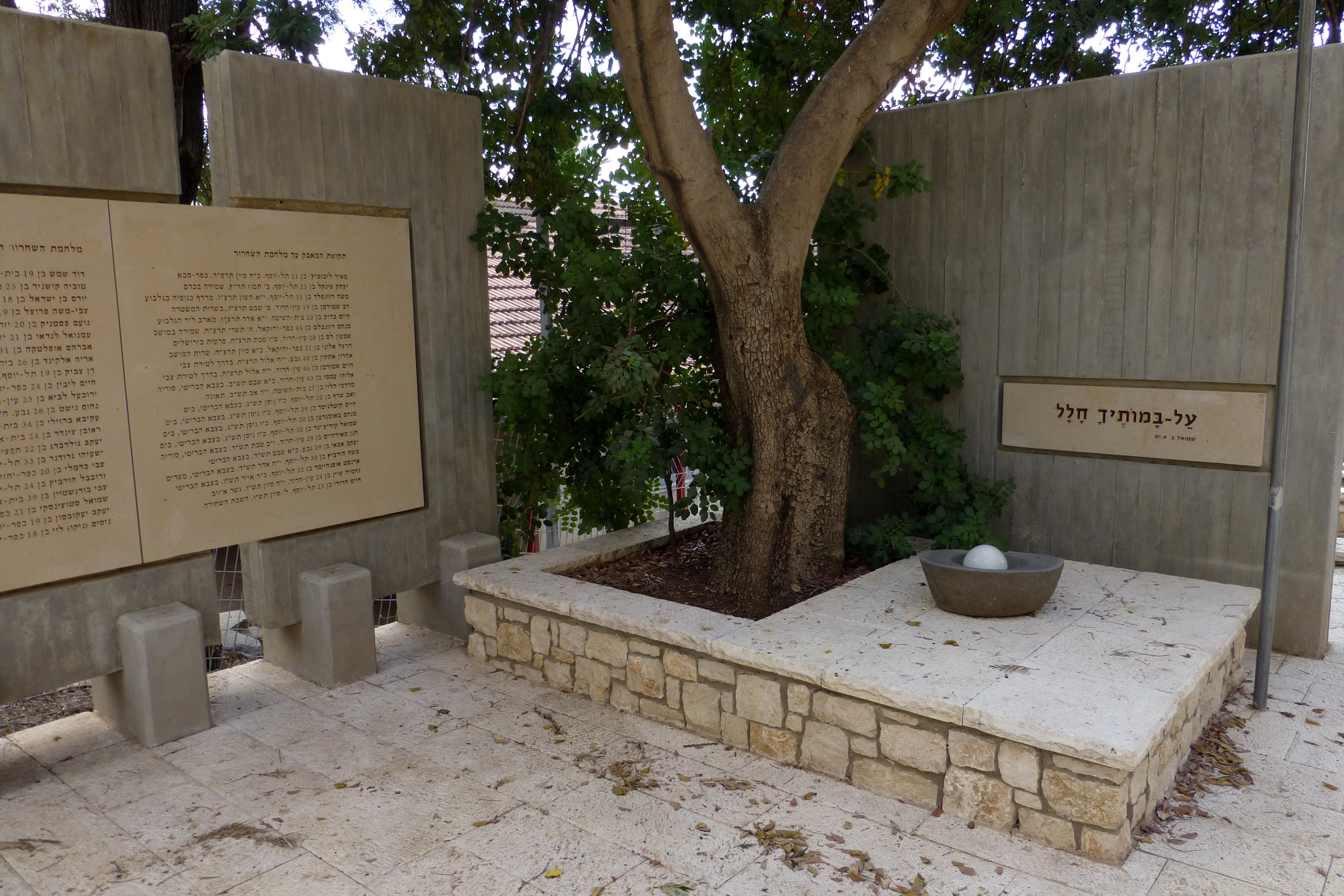 מוזיאון בית שטורמן המצוי בקיבוץ עין חרוד מאוחד נוסד בשנת 1941 על ידי חבר הקיבוץ שמואל סבוראי כמוזיאון לטבע.